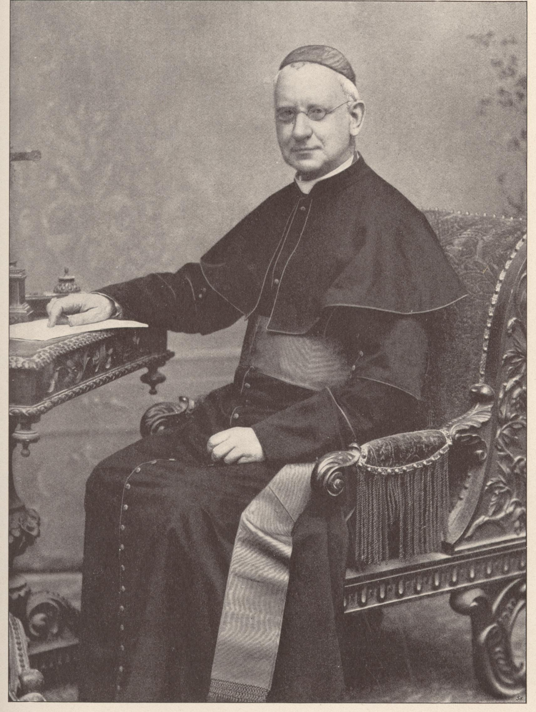 Kurienkardinal Andreas Steinhuber